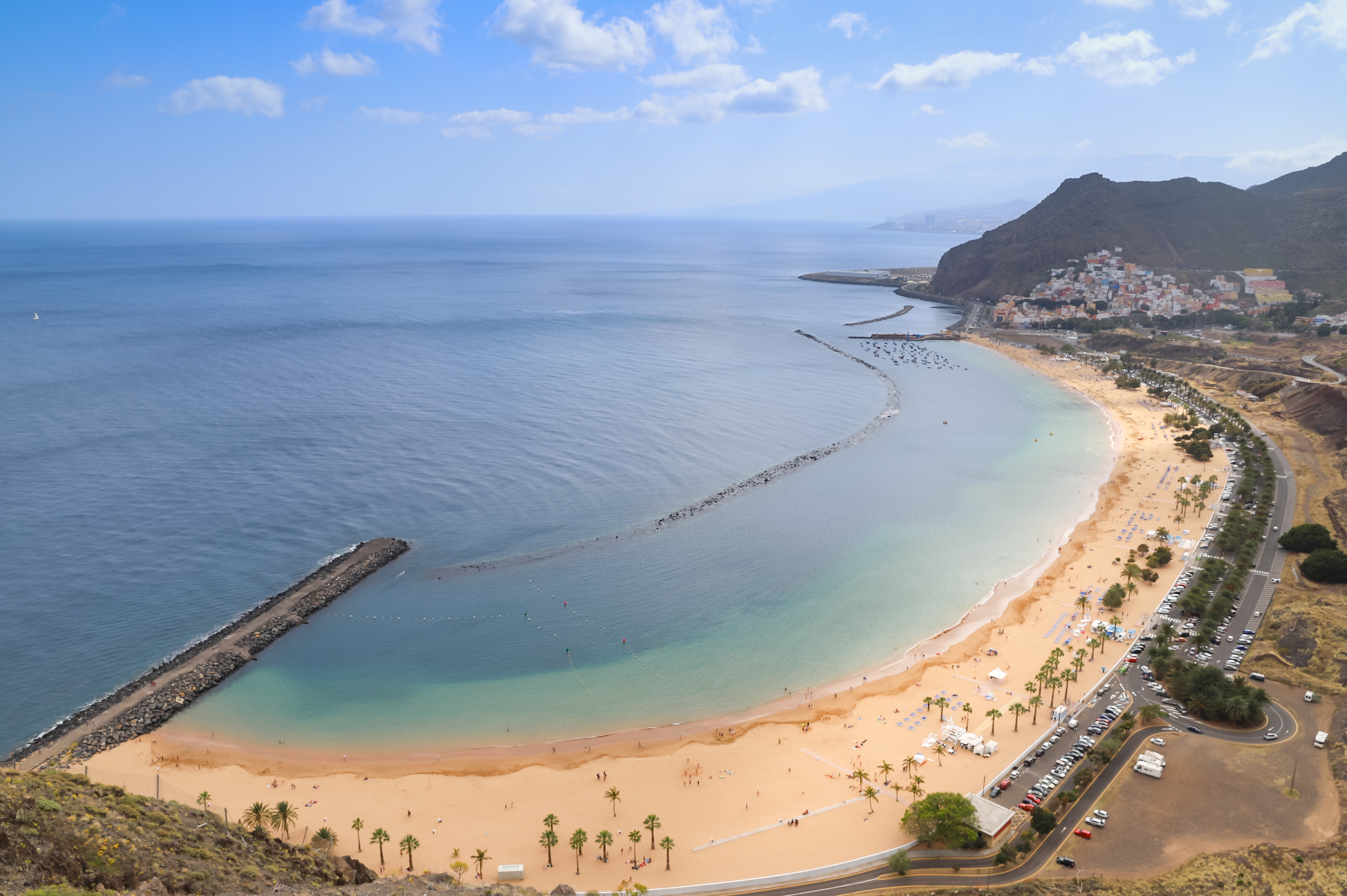 Tenerife